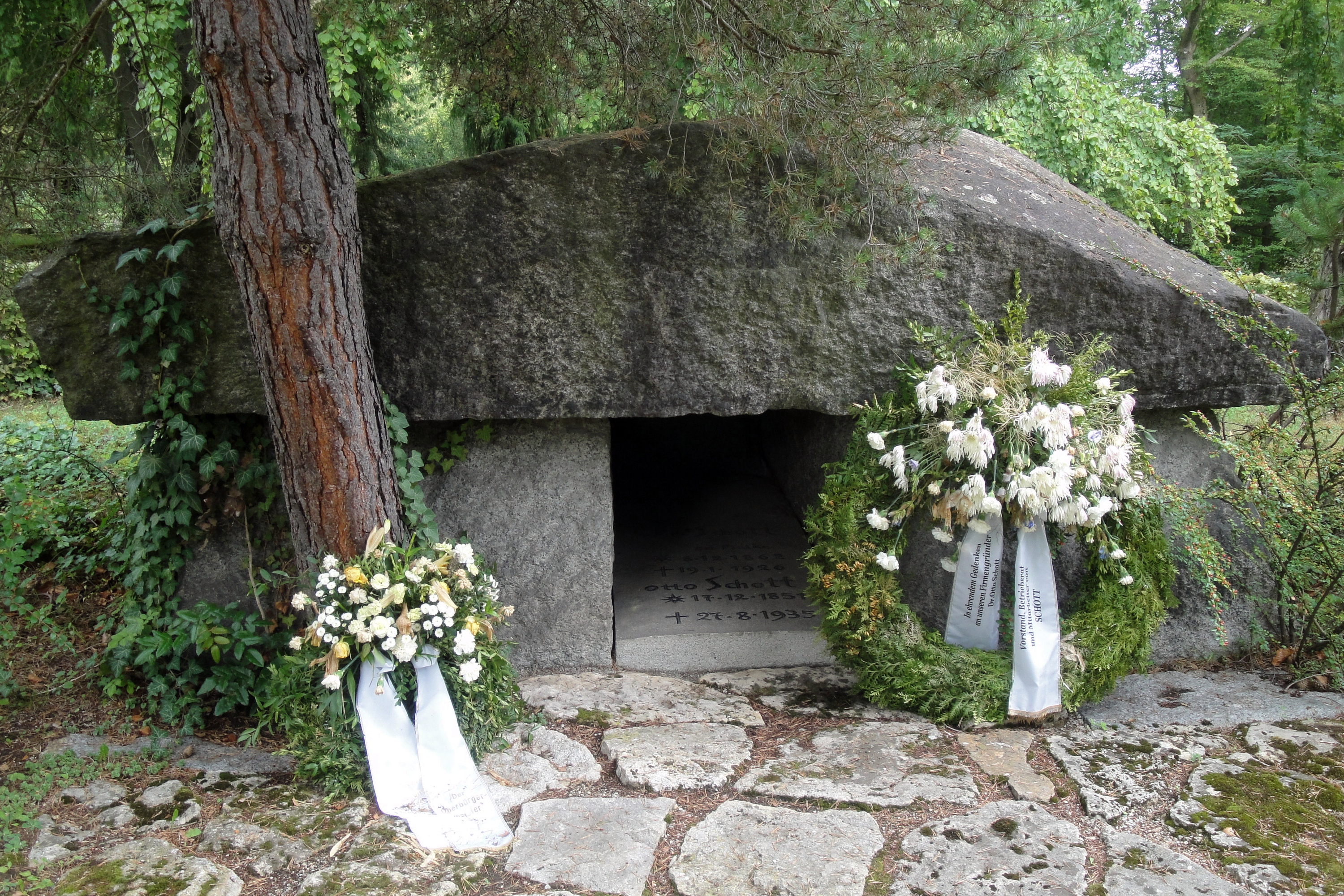 Grab von Otto Schott auf dem Nordfriedhof in Jena